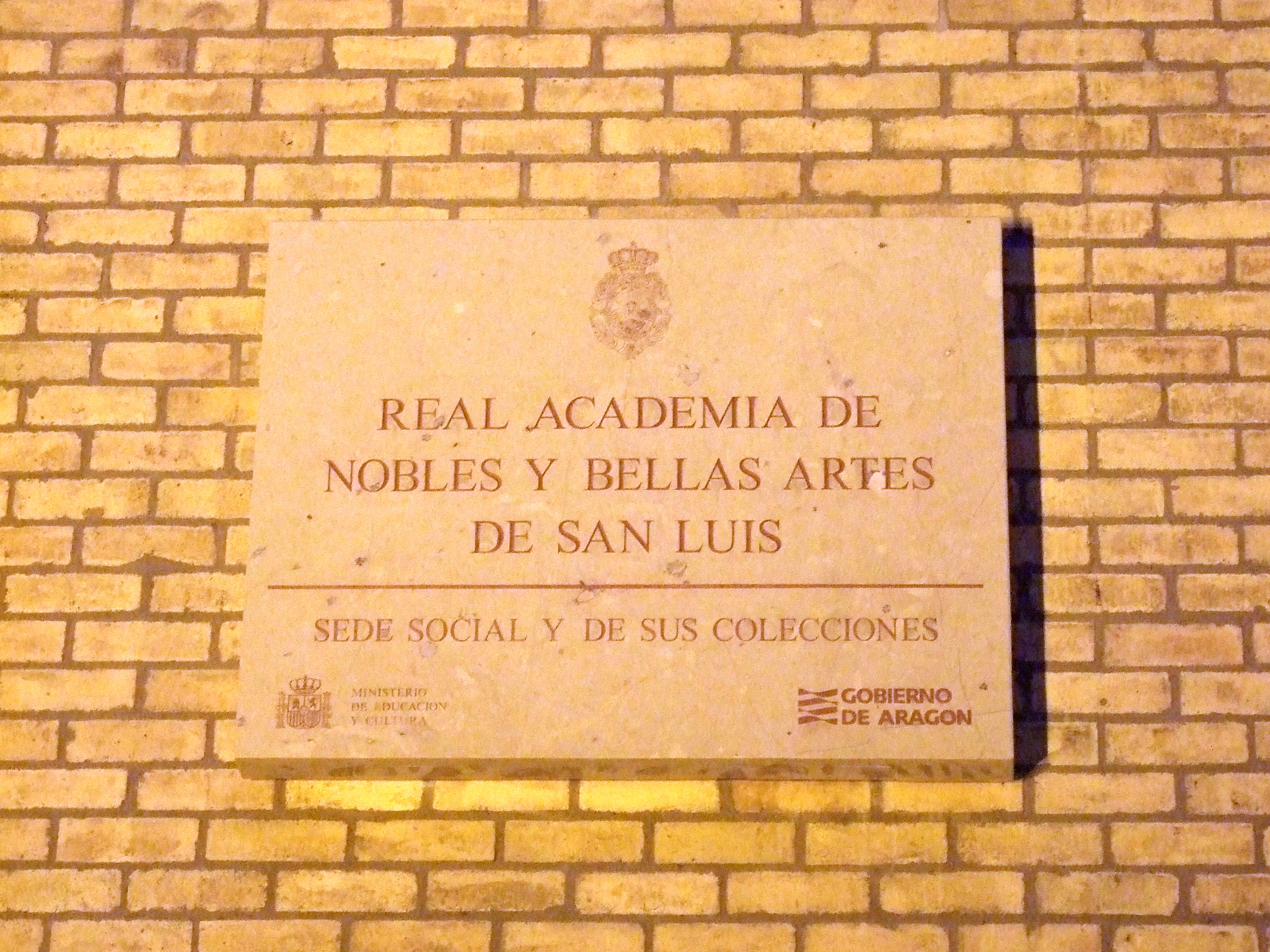 Zaragoza - Museo de Zaragoza - Placa de la Real Academia de San Luis